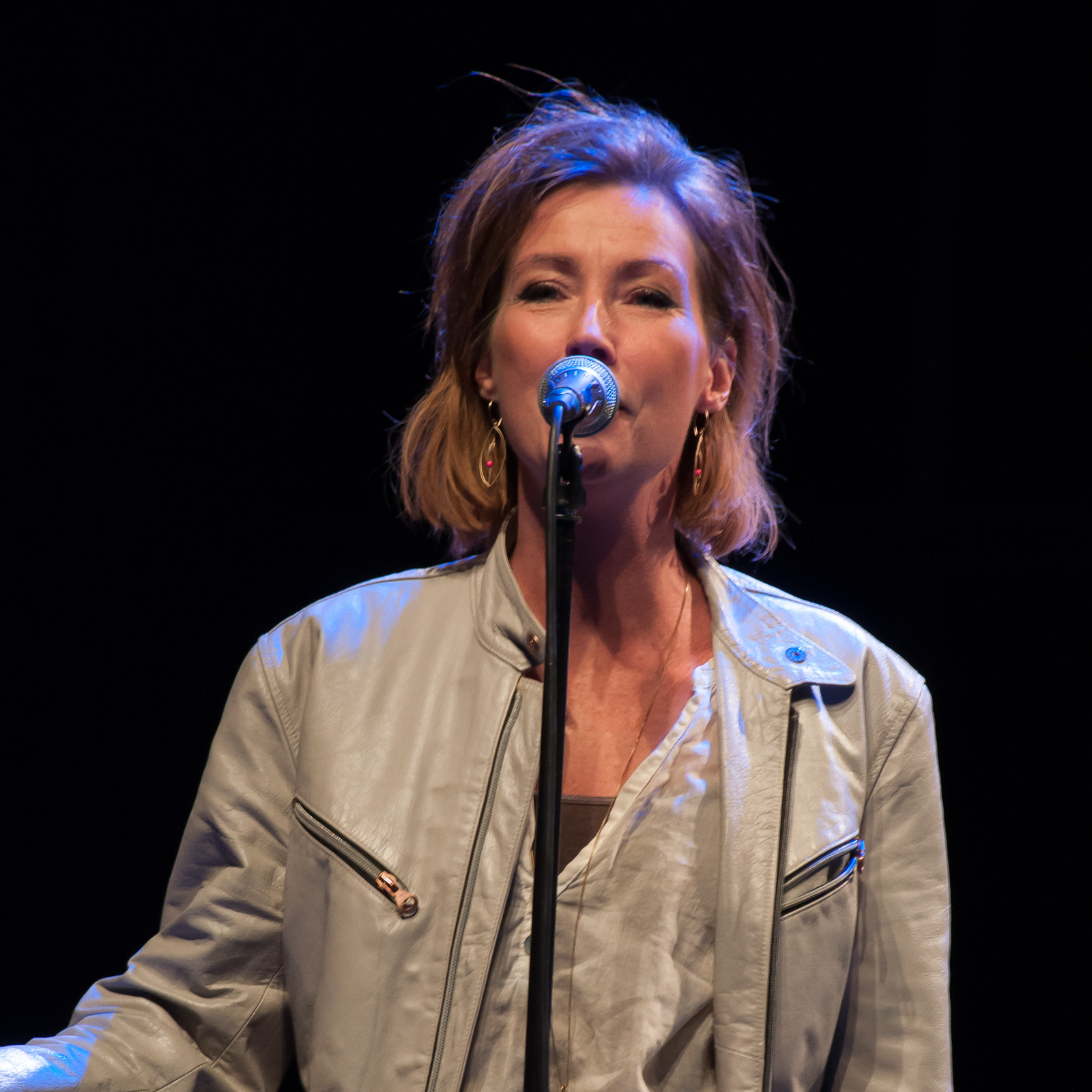 Fredagsrock med Sebastian og band 2013